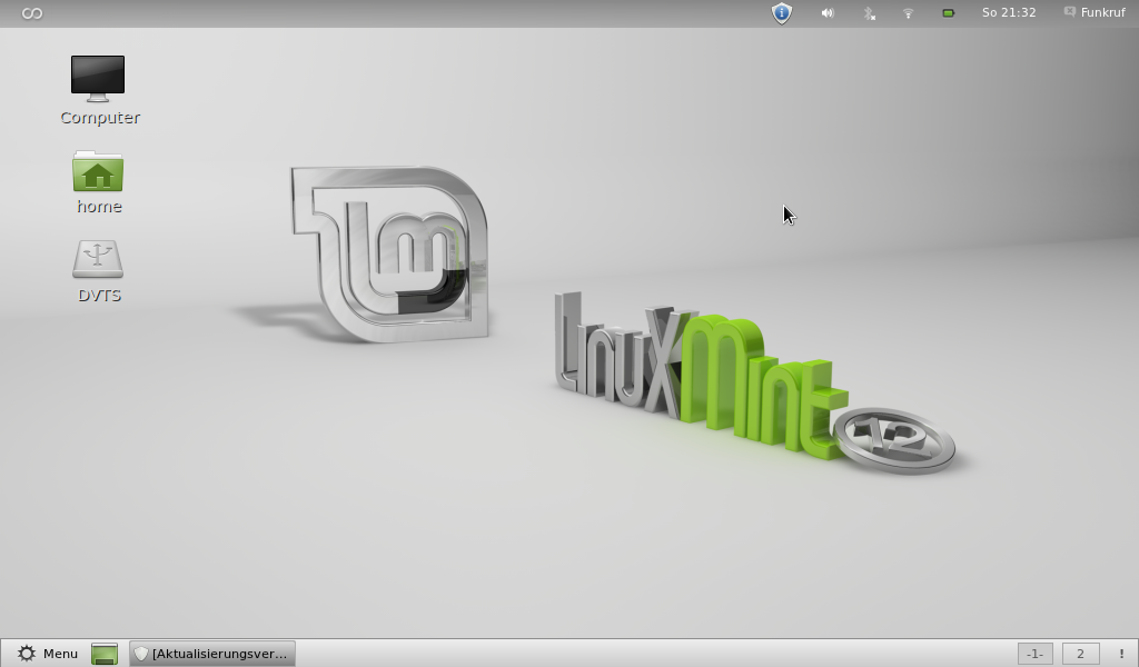 Linux Mint 12 mit der Oberfläche GNOME 2-Fork (die Übergangslösung zu GNOME 3)